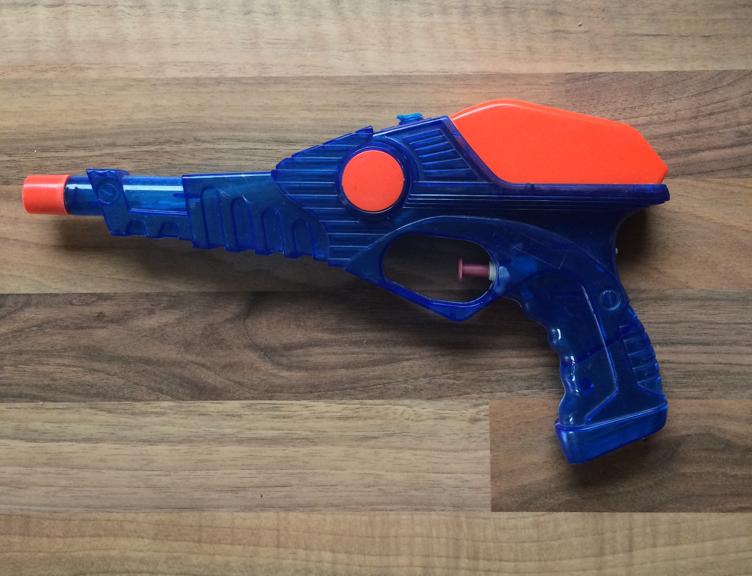 Wasserspritzpistole